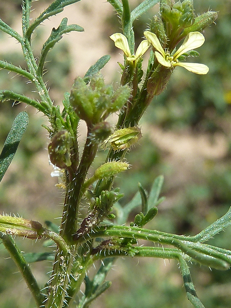 Carrichtera anua (Cucharilla, Mastuerzo valenciano) - Flores - Colonia Illicitana (Falda meridional de la Sierra de Crevillente), Albatera (Alicante, España).